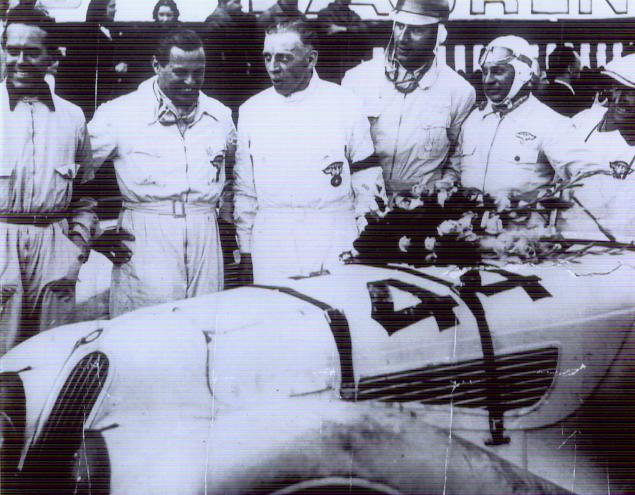 Das Bild zeigt Ralph Roese (3. von links) und das erfolgreiche Team nach dem Rennen 24 h Spa in Belgien, bei dem die ersten 3 Plätze in der 2 Literklasse gewonnen wurden. 1. Ralph Roese/Max Schaumburg-Lippe Start Nr. 42, 2. Paul Heinemann/Adolf Brudes Start Nr. 44, 3. Willi Briem/Rudolf Scholtz Start Nr. 46, alle auf BMW 328.